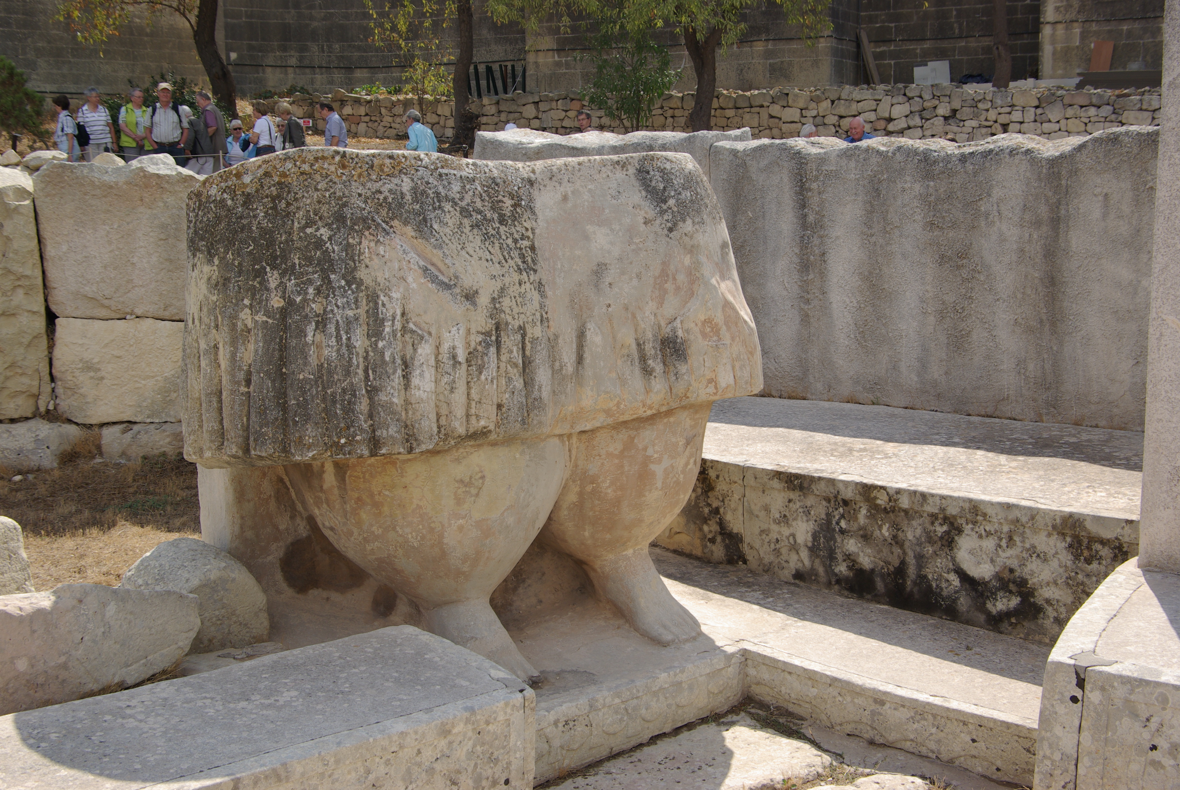 Malta, Tempel von Tarxien, Magna Mater. Kopie, das Original befindet sich im National Museum of Archaeologie in Valetta.